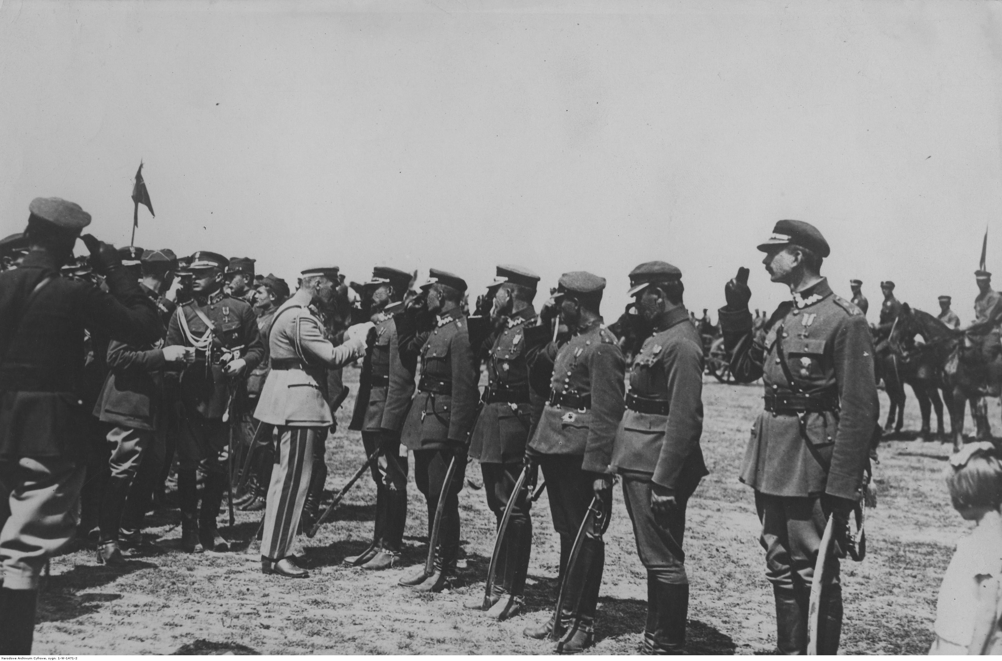 Dekoracja wojskowych z 4 Dywizjonu Artylerii Konnej w Górze Kalwarii 3 sierpnia 1921. Marszałek Józef Piłsudski odznacza żołnierzy 4 DAK-u. Koncern Ilustrowany Kurier Codzienny - Archiwum Ilustracji. Sygnatura: 1-W-1471-2